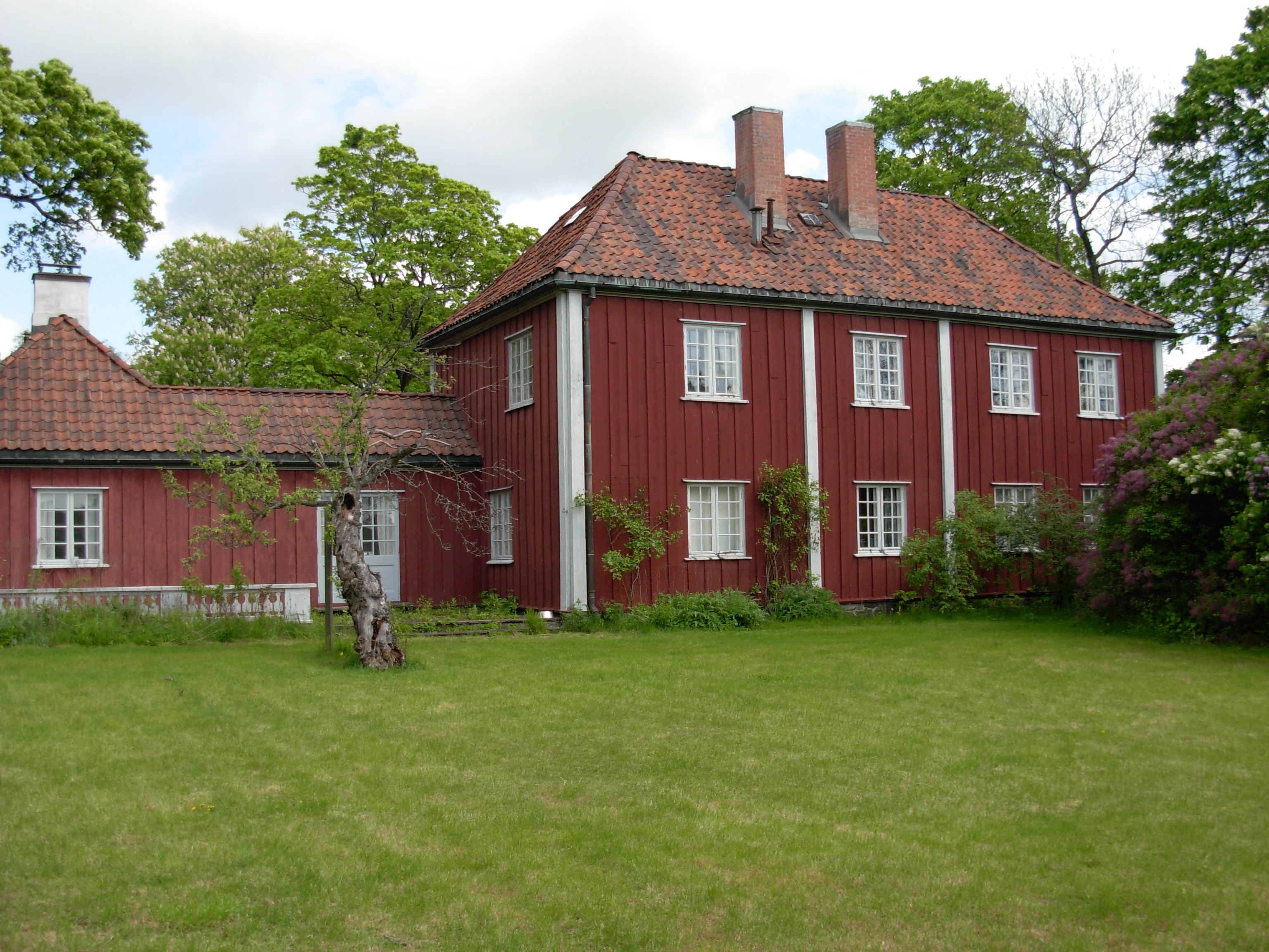 Vøyenvolden gård, hovedbygningen sett fra syd, Sagene, Oslo